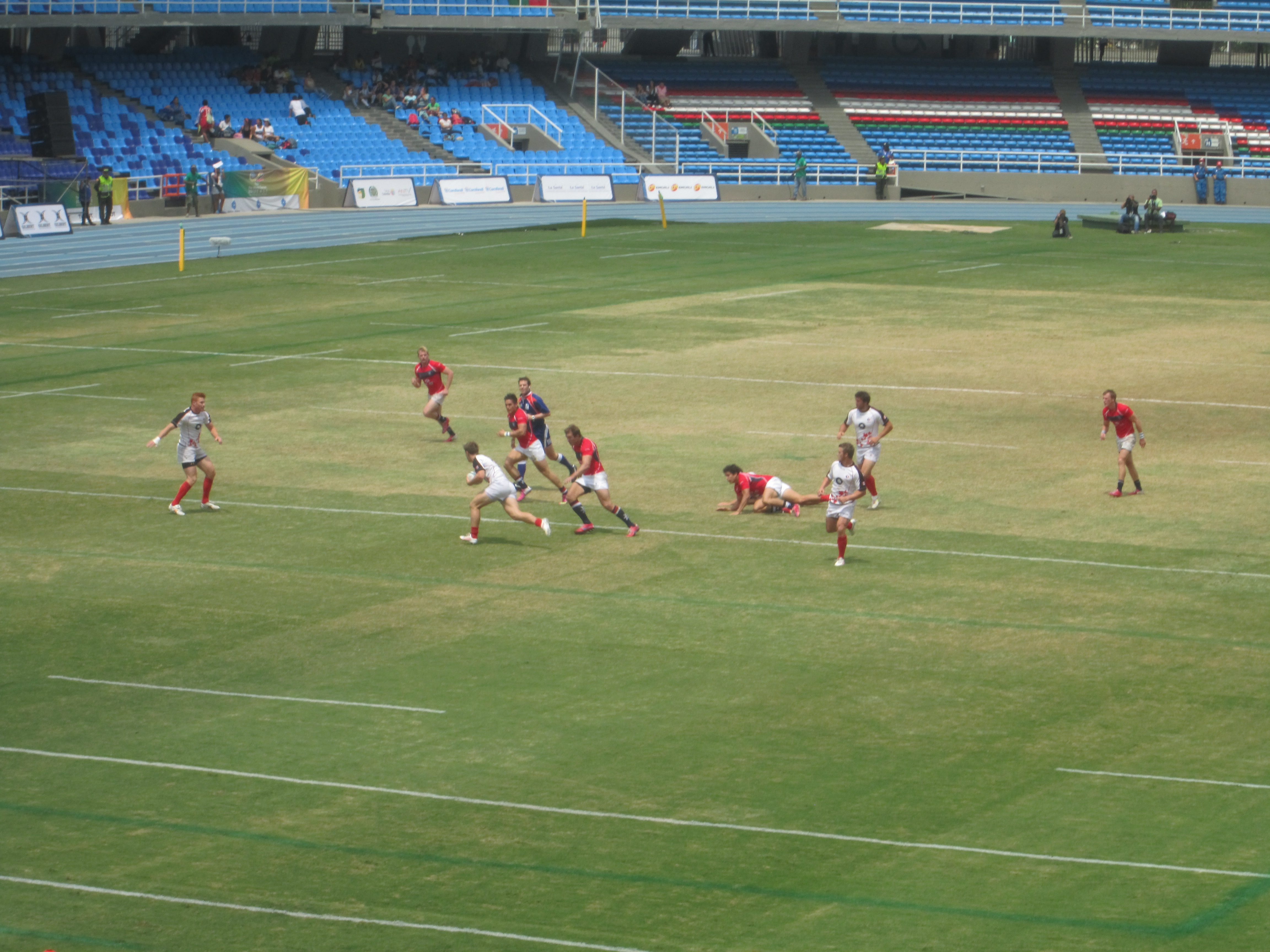 Juego entre Hong Kong y Canadá - World Games 2013